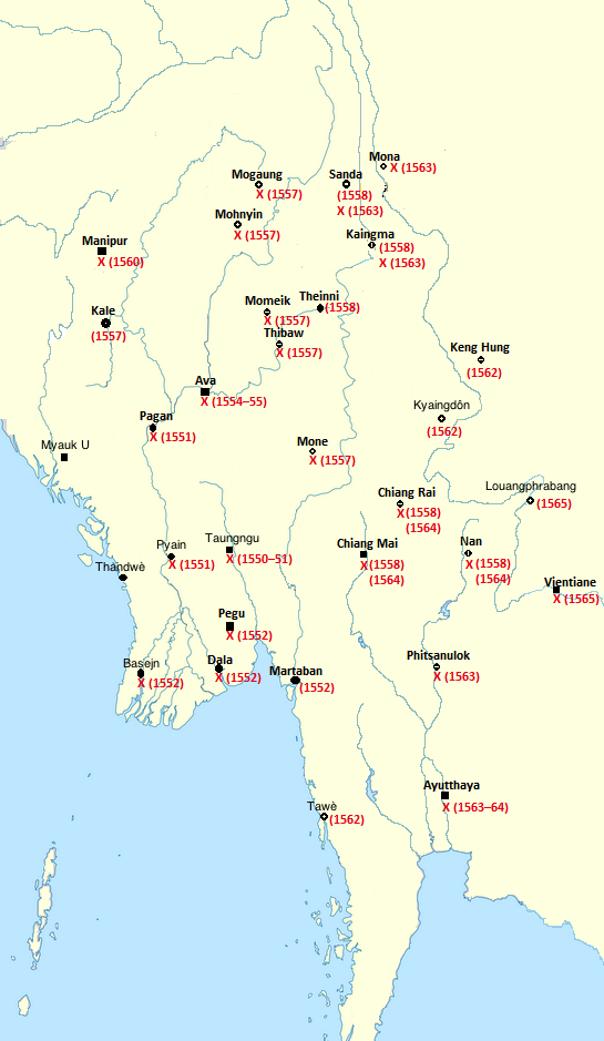 Kampanie miltarne królestwa Taungngu (1550-1565)